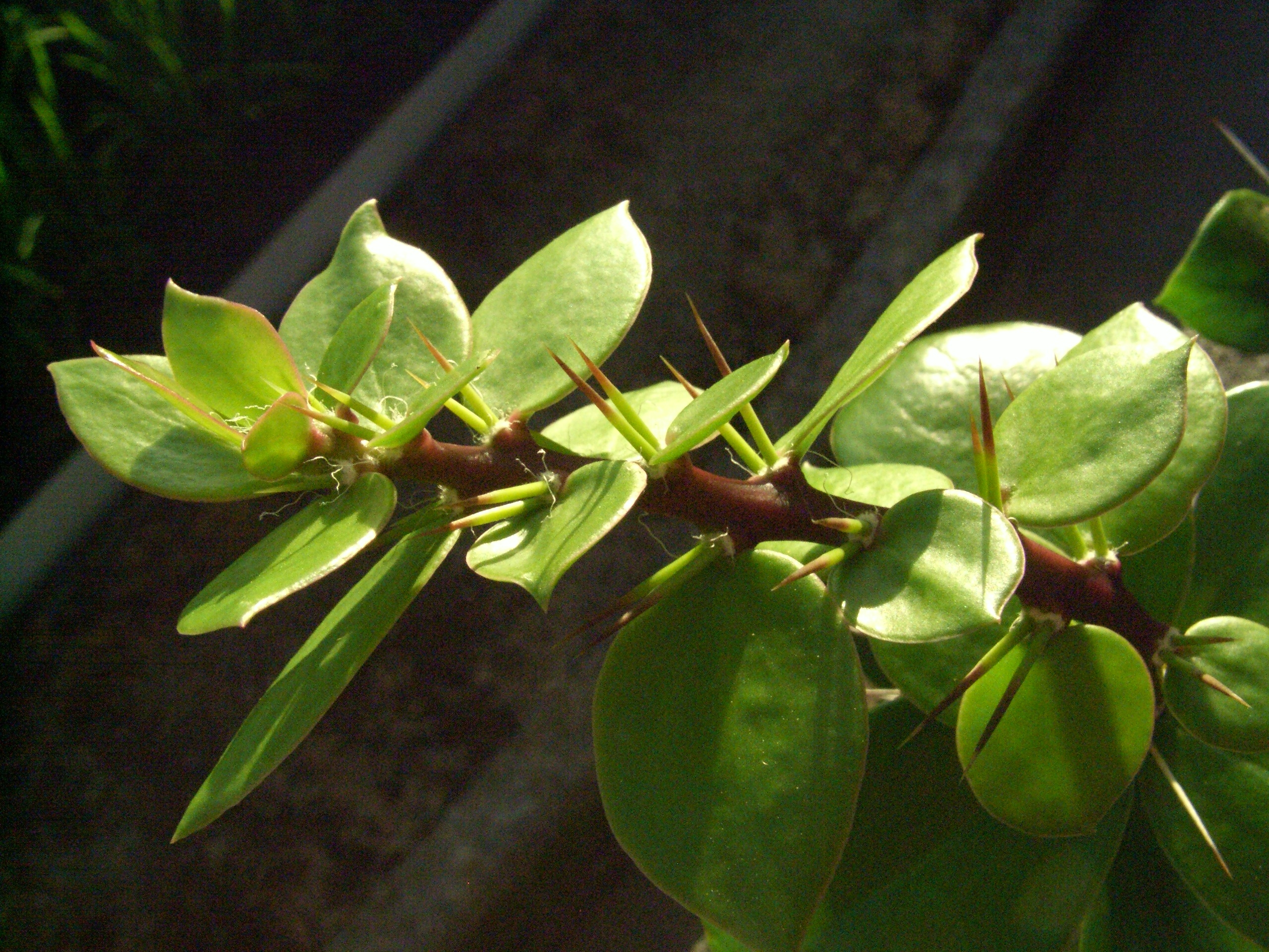 月の砂漠 (Pereskia lychnidiflora)の新枝